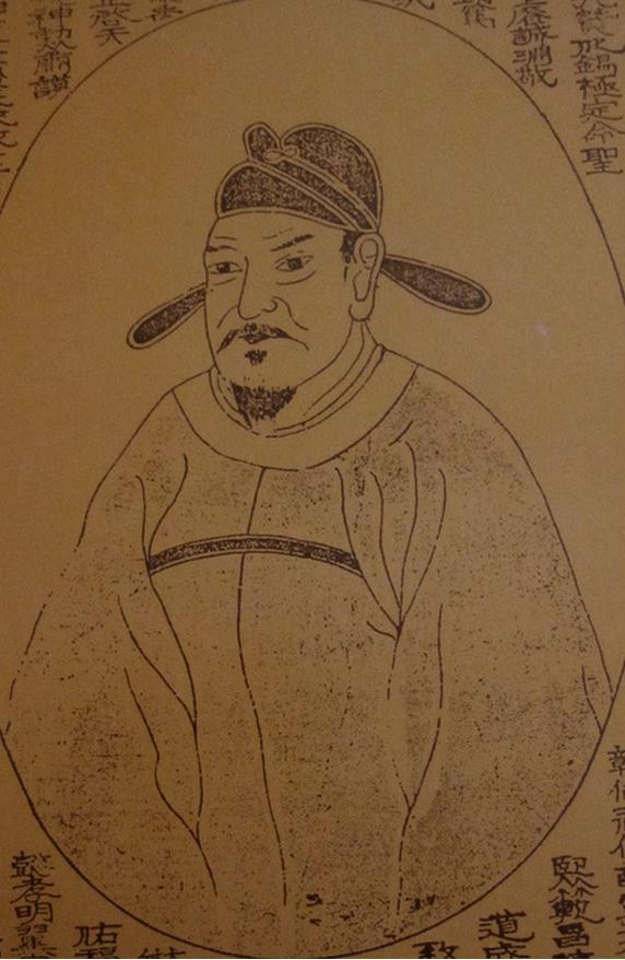 조선 익종 영정